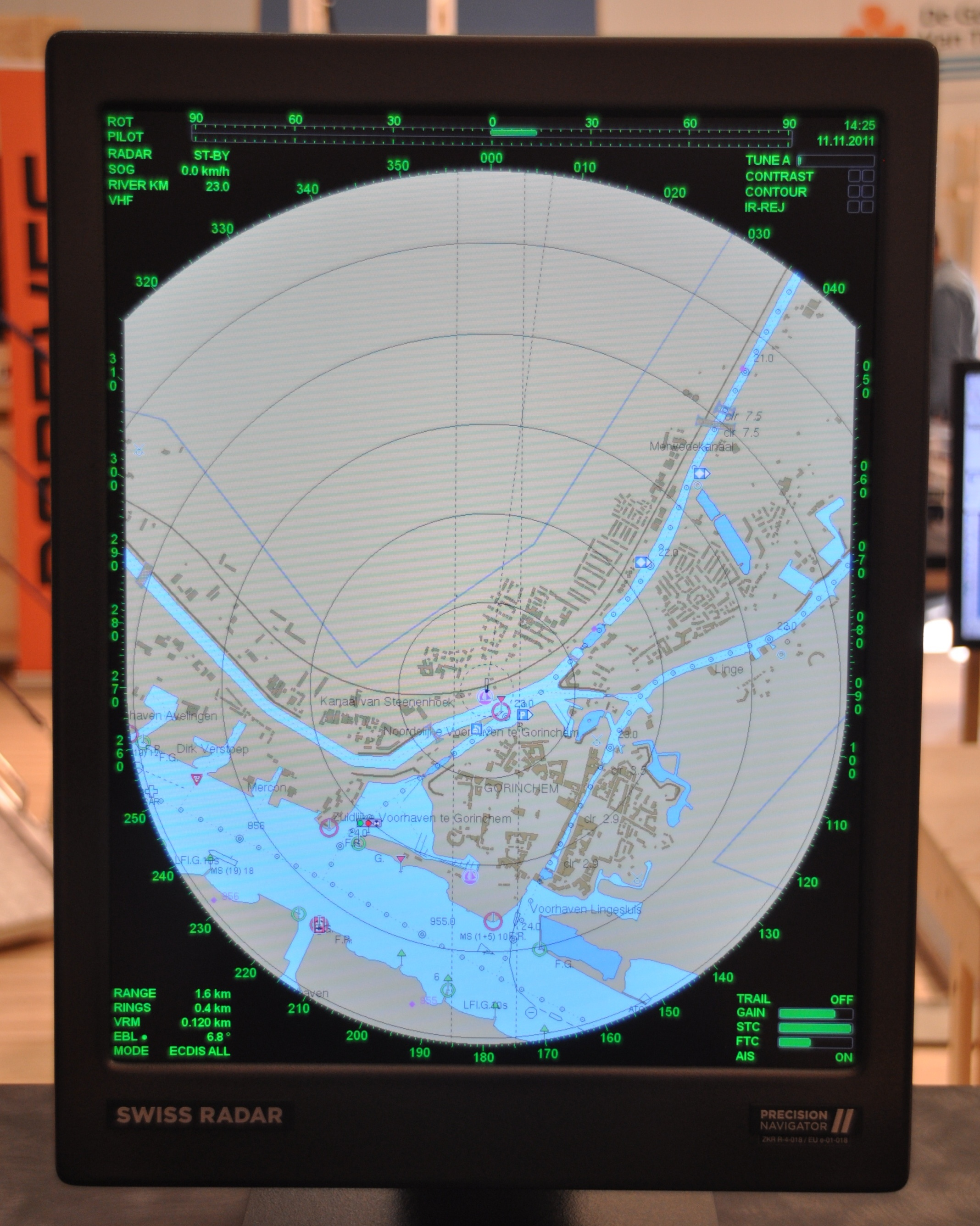 Equipment for the shipping industry